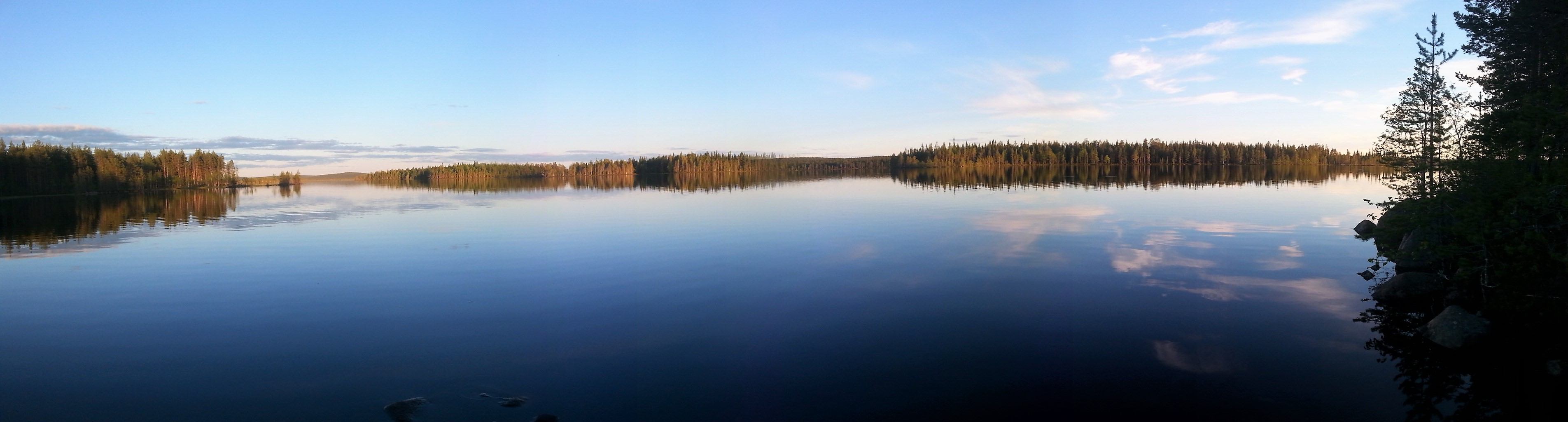 Enijärvi, oikealla Teeriniemi, siitä vasemmalle Teerisaari ja Halmesaari.